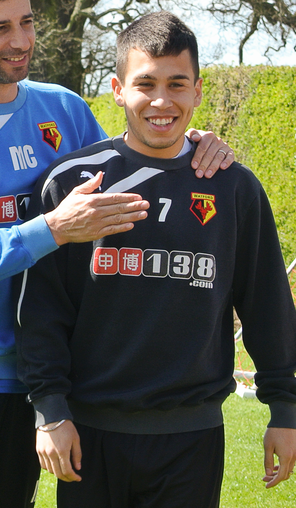 Cristian Battocchio